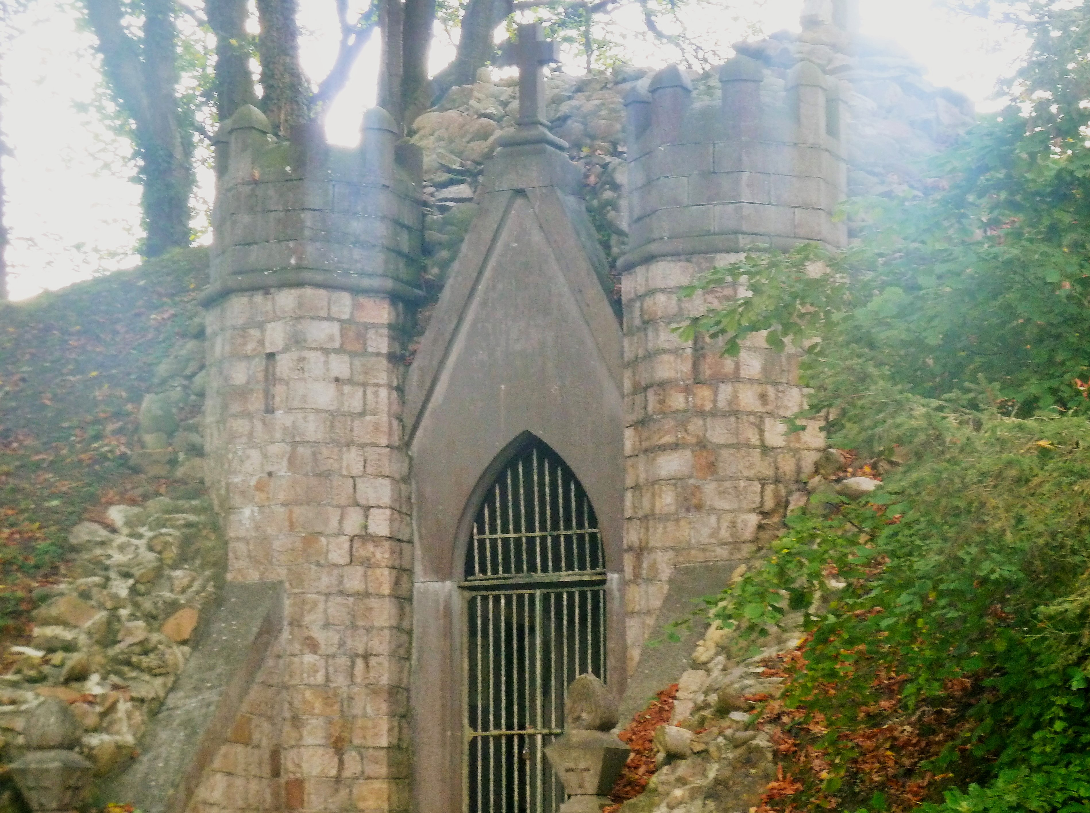 Le mausolée du Philanthrope (caveau Delvallée) Wargnies-le-Grand Nord.- France.